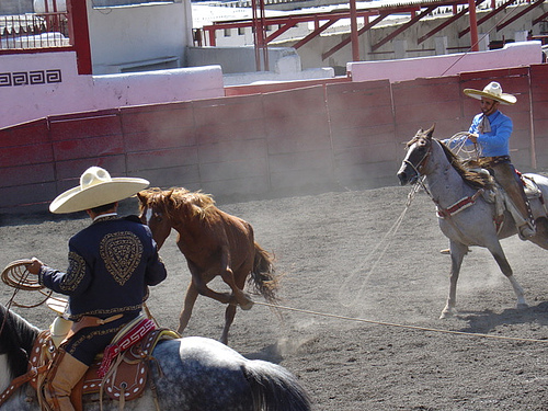 Mexican charro, charreria, charreada, Mexico